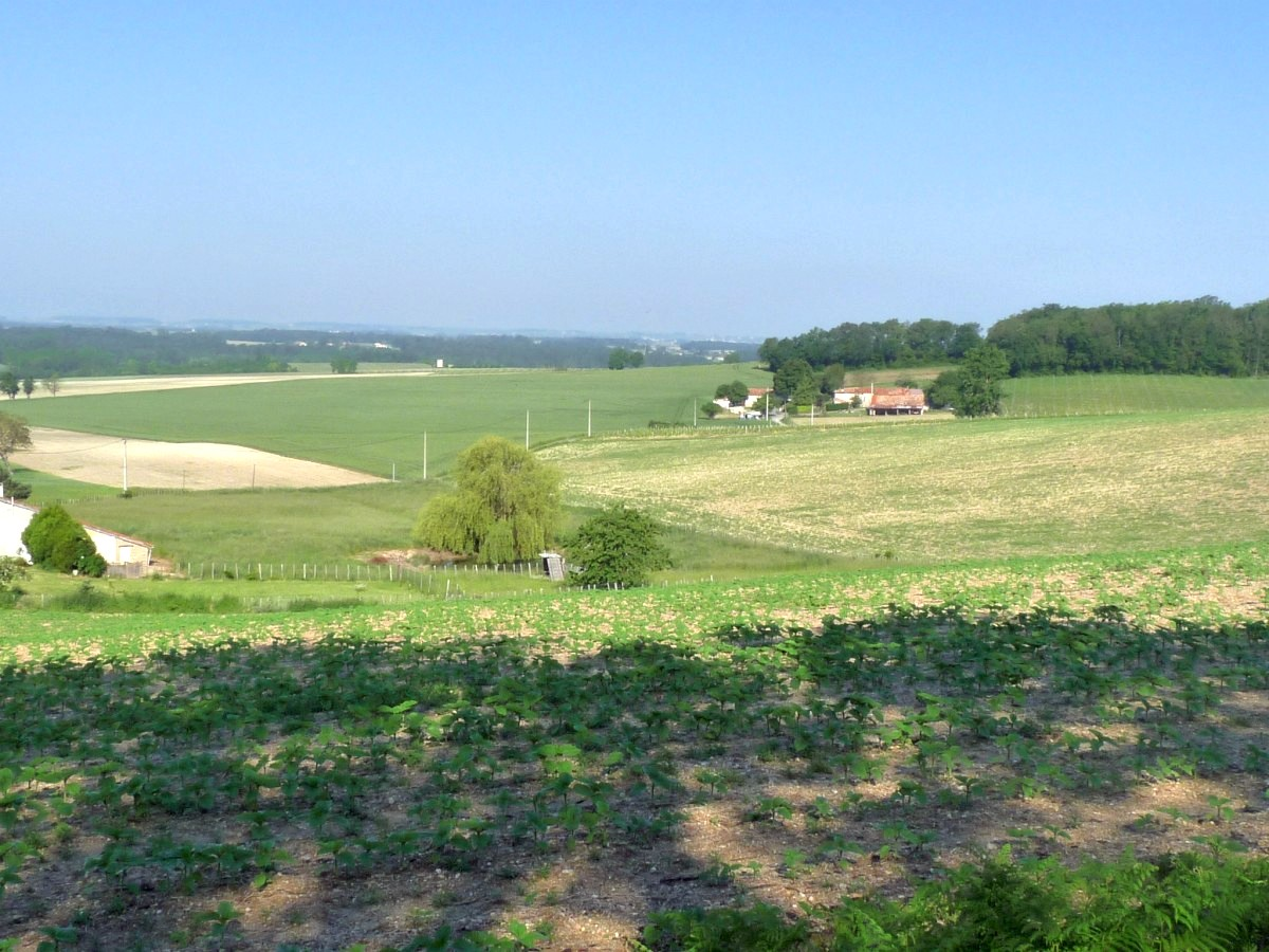 vue vers la plaine de Barbezieux depuis la D.46 (Brie-sous-Barbezieux, Charente, France)